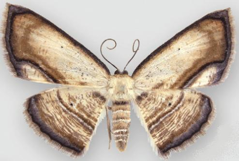 Campatonema tapantia female